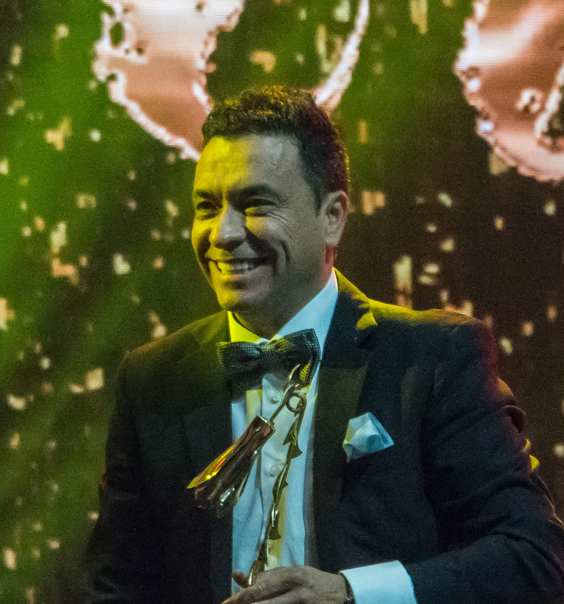 Claudio Palma, Copihue de Oro 2018, Sun Monticello, Mostazal, Región de O'Higgins, Chile